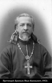 Арсеньев, Иоанн Васильевич -священник